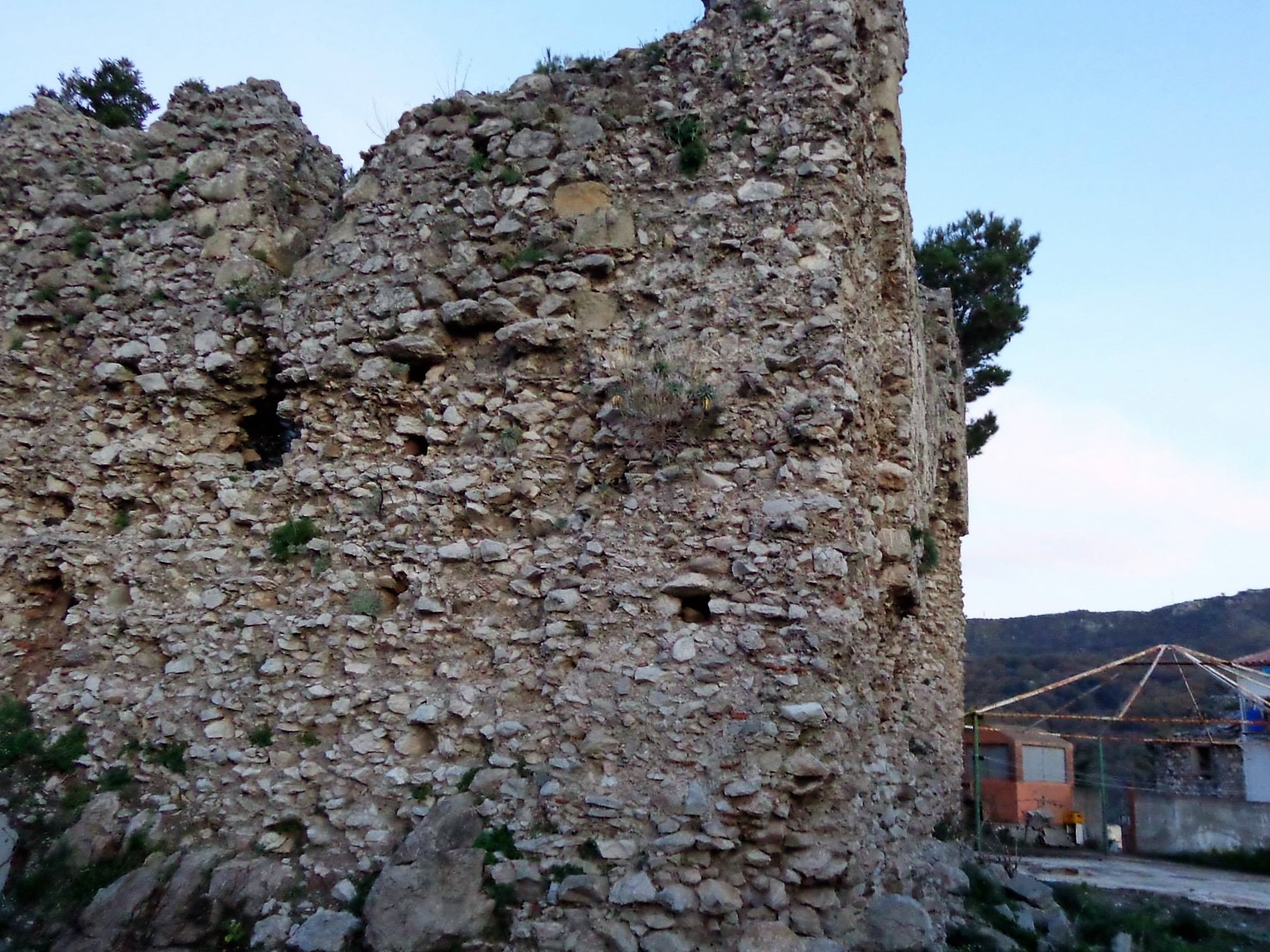 Castello di Novara di Sicilia, ruderi. Natale 2015, scatto già presente su profilo personale FB.